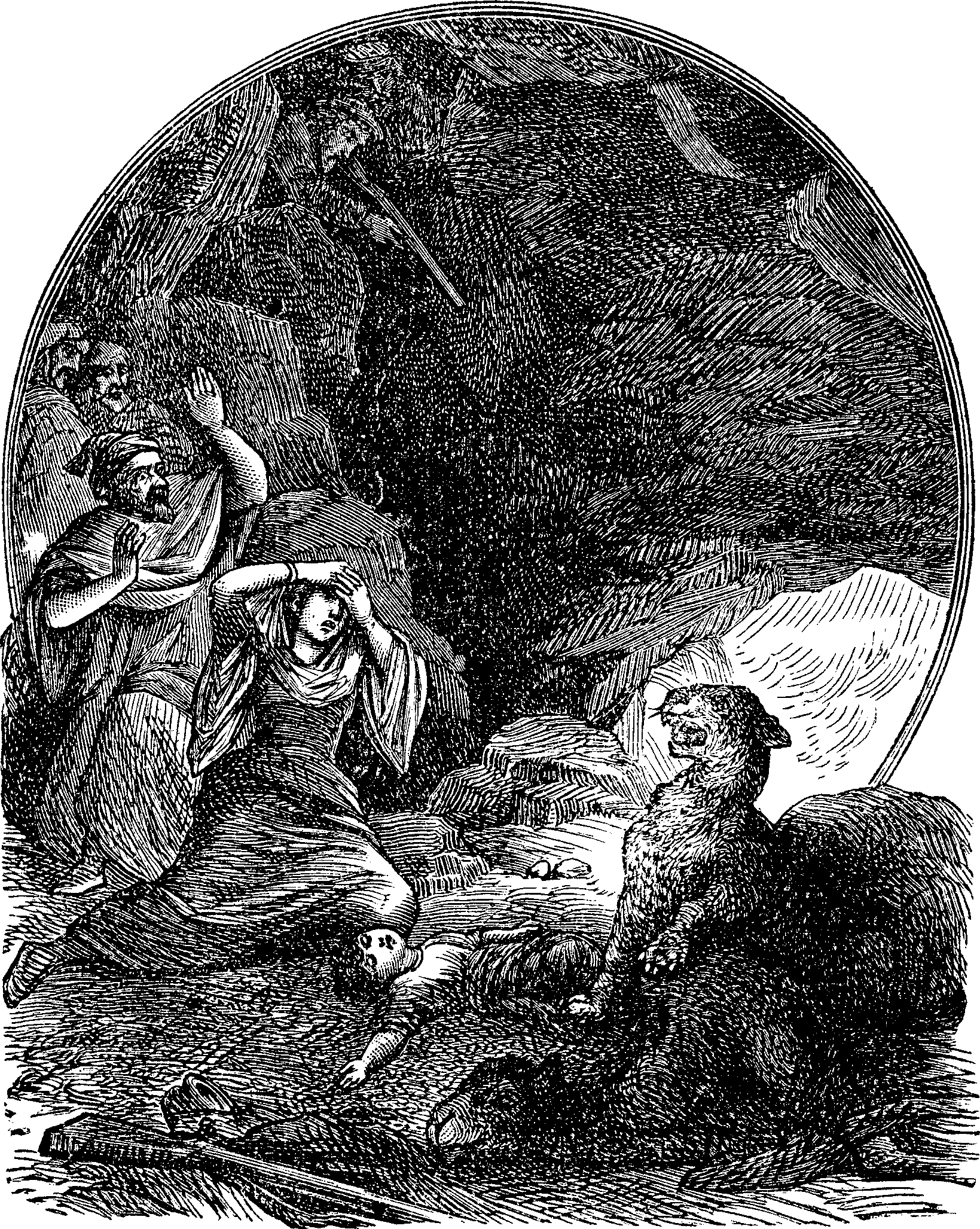 Christus oder Muhammed